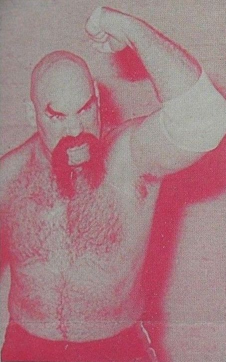 Alfred Hayes en p.2 du programme de catch du St Louis Wrestling Club du 27 décembre 1975